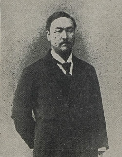 本多政以の肖像写真。